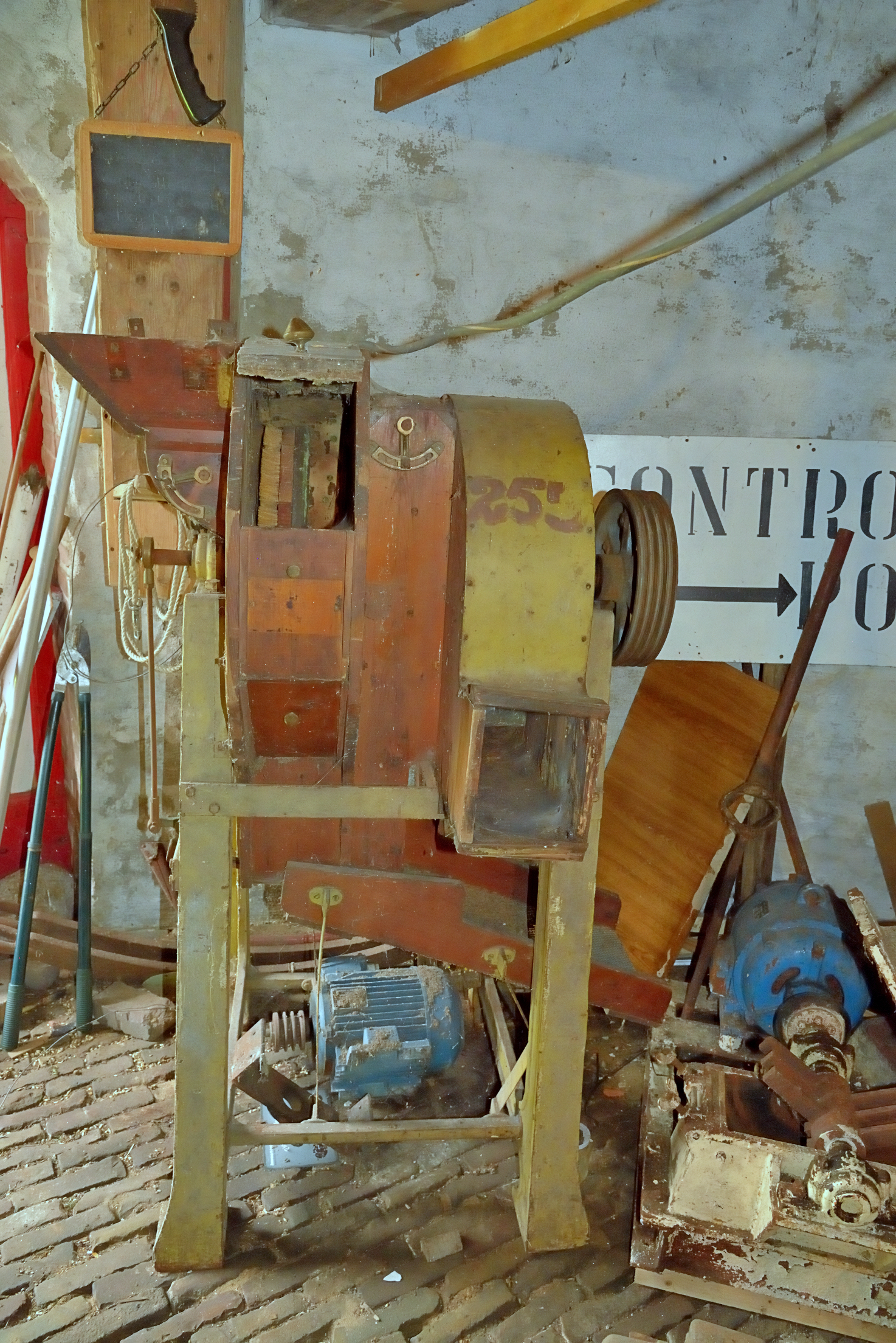 De Heidebloem, Erica, poetsmachine. Werd (en wordt) gebruikt in het voorreinigingstraject voor met name baktarwe. Via de inloop aan de linkerkant loopt een stroompje graan de machine in en komt in de ruimte tussen de borstels terecht. De borstels zitten op een draaiende schijf, het graan kan er alleen maar uit door onder de borstels door te gaan. Hierbij wordt aanhangend stof en vuil van de graankorrel afgepoetst, ook uit de naad die in een tarwekorrel zit.